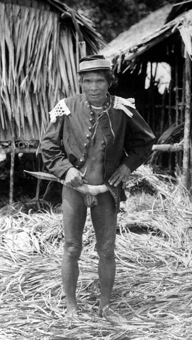 Repronegatief. Radja Si Lobaie van de Mentawai eilanden.